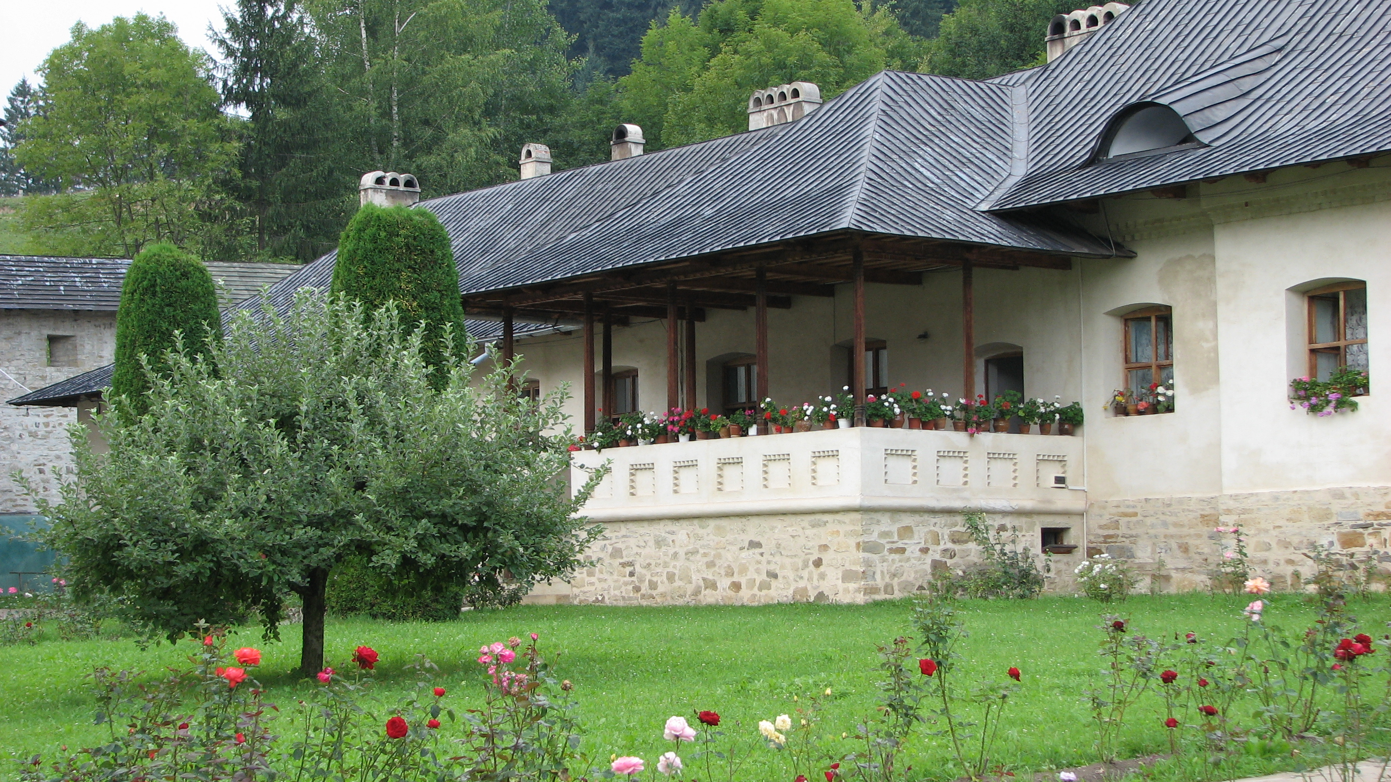 Mănăstirea Putna - Bucovina - România